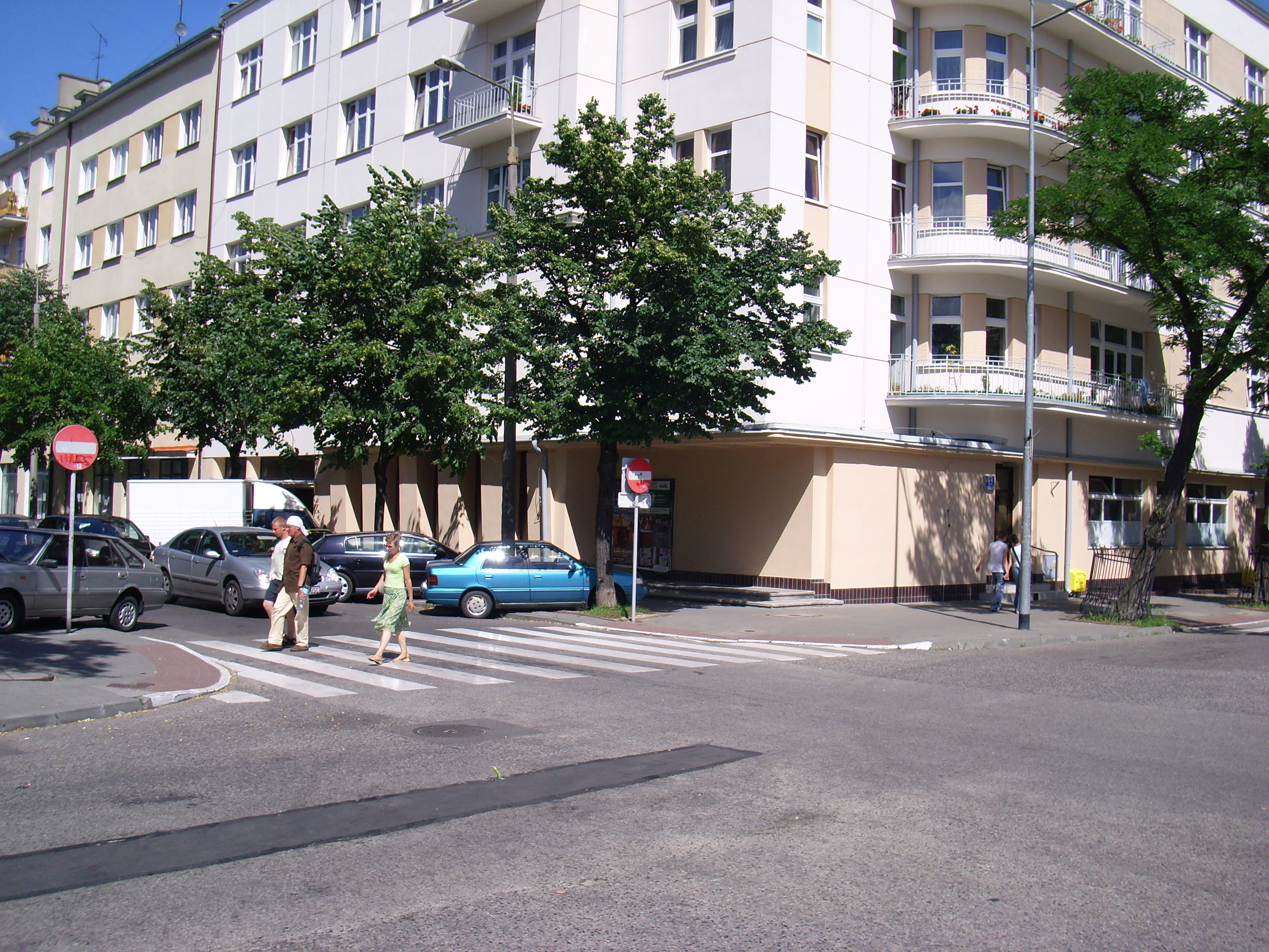 wejście do pomieszczeń zlikwidowanego kina Goplana w Gdyni